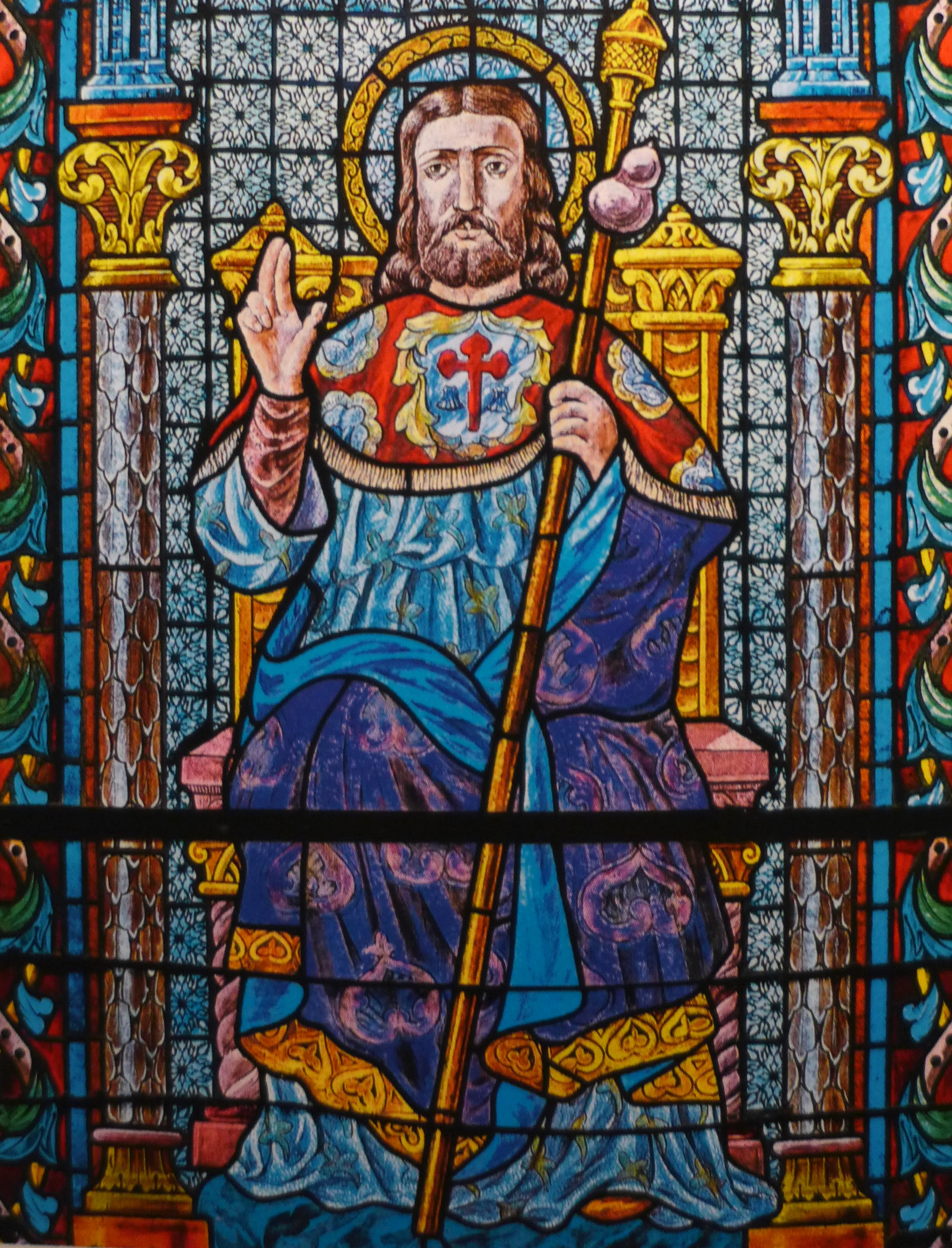 Szent Jakab festett üvegmozaikon a Santiago de Compostela-i katedrálisban